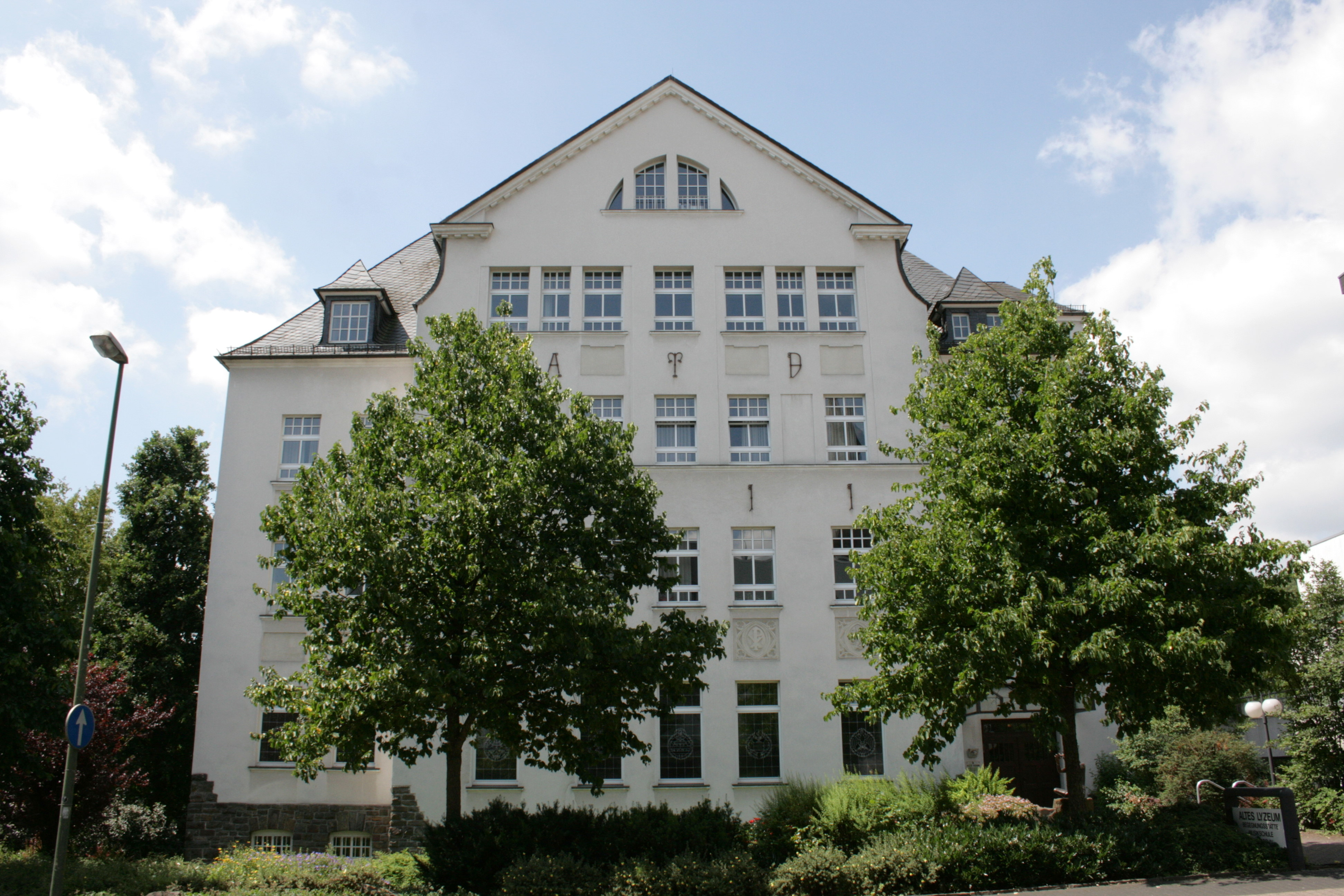 Altes Lyzeum, jetzt Begegnungsstätte, Musikschule und Stadtarchiv, Franziskanerstraße in Olpe